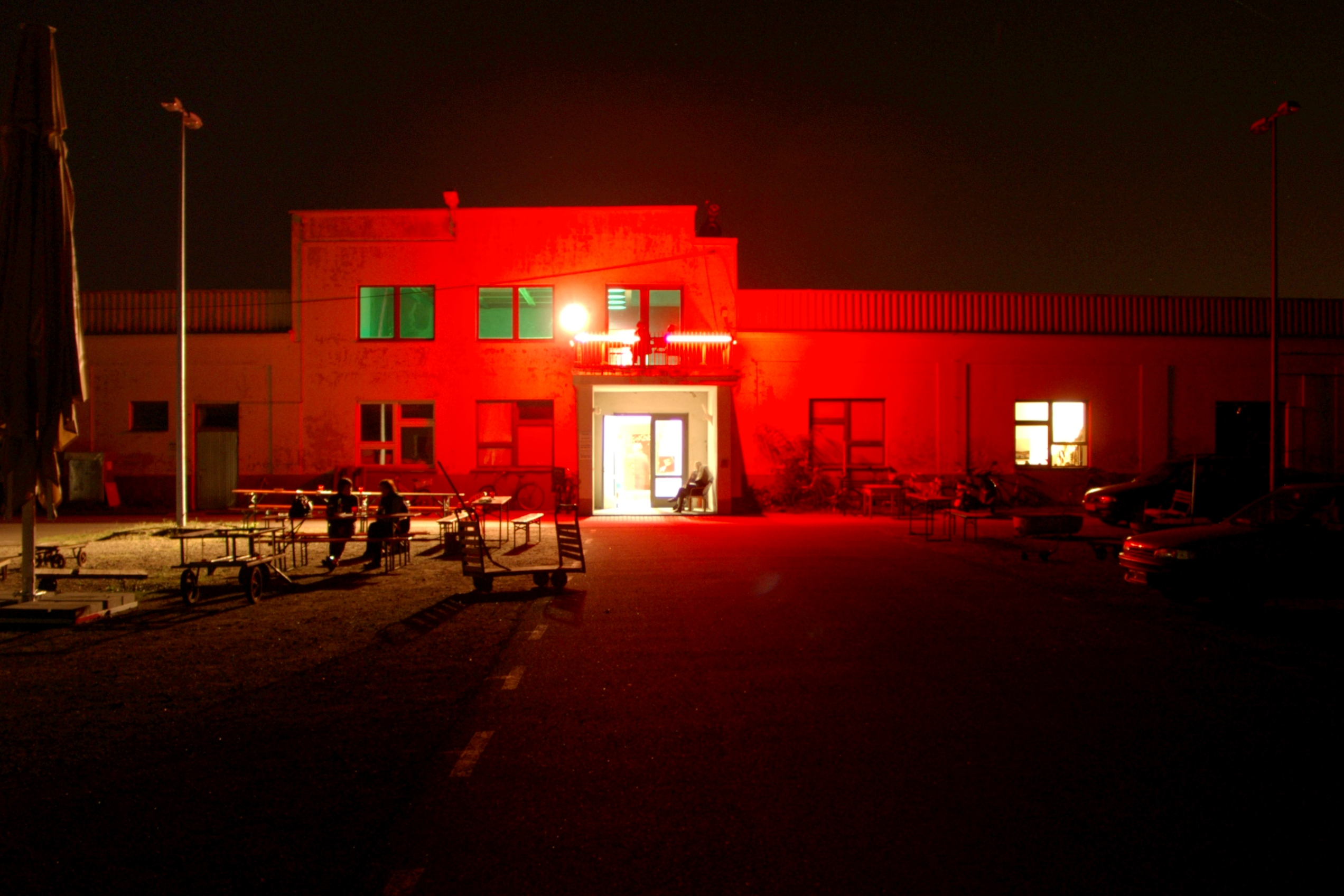 Der Sozialtrakt des Vieh- und Schlachthofes im Ostragehege